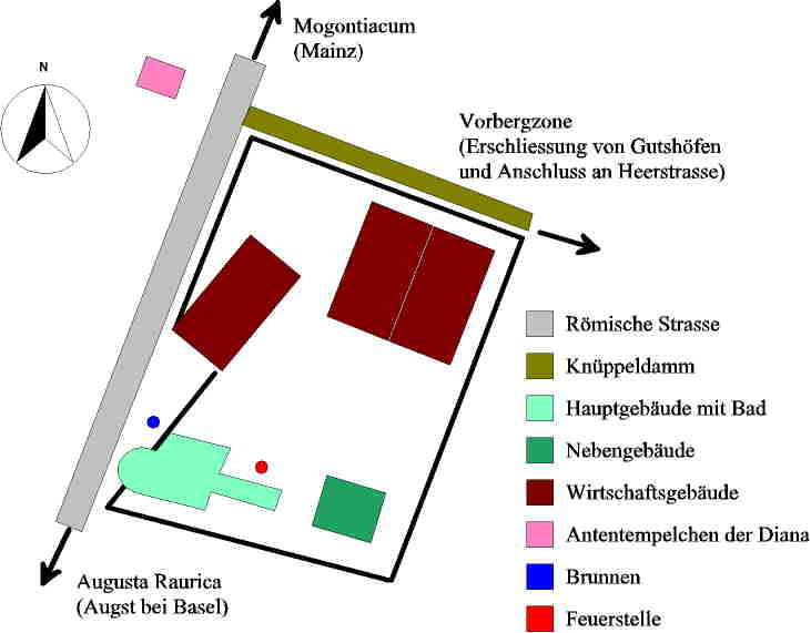 Römische Straßenstation (Friesenheim) , ungefähre Skizze